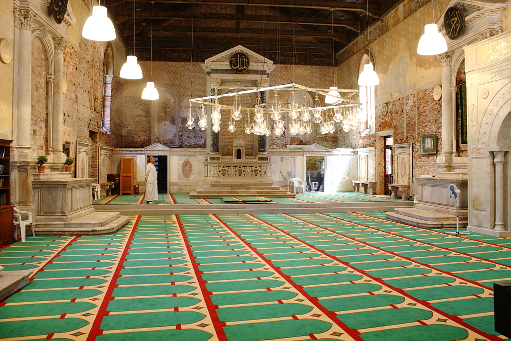 interno chiesa della Misericordia a Venezia trasformata in moschea dall'artista svizzero Christoph Büchel